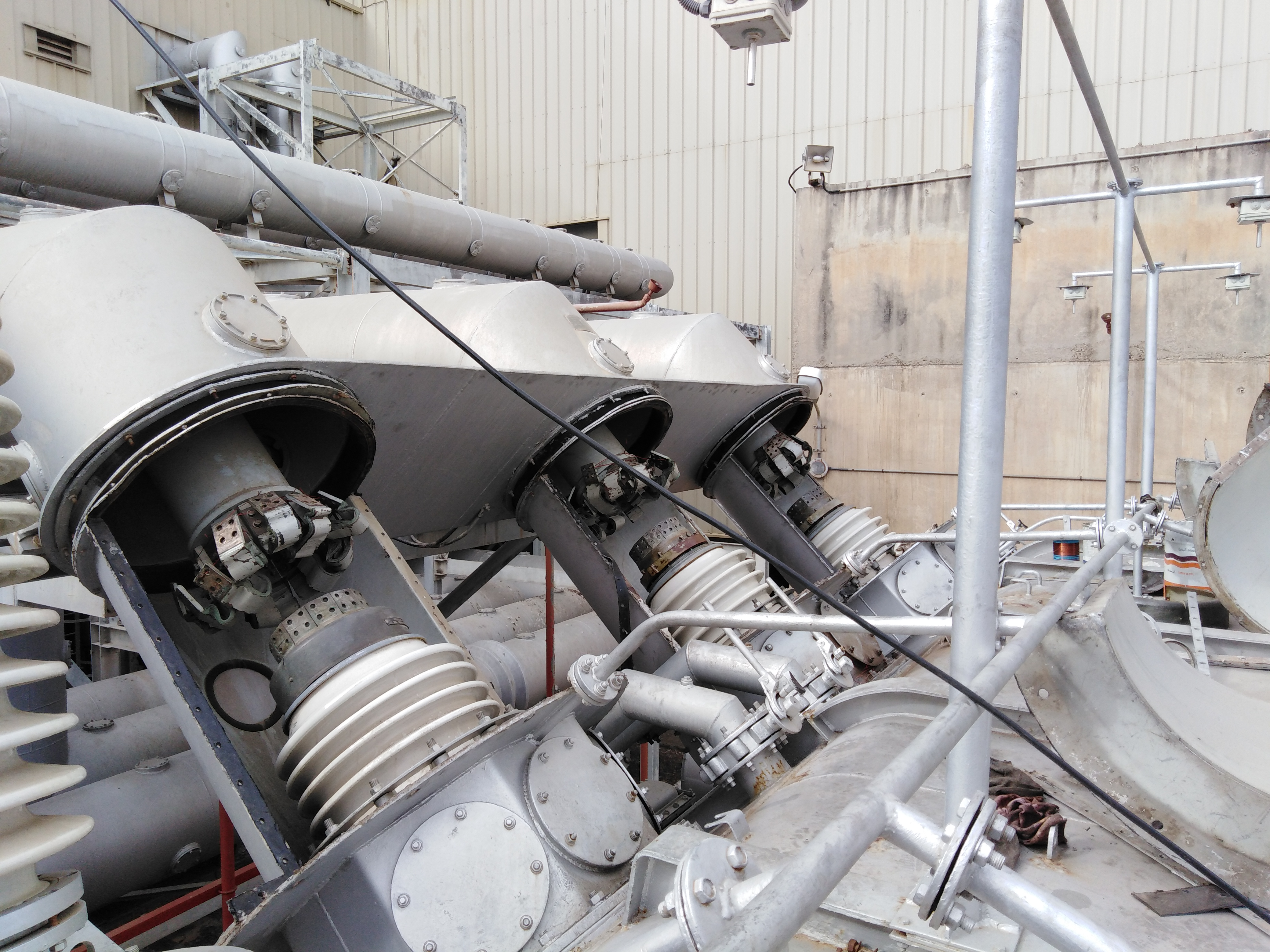 Алжир. ТЕС Джиджель. 2 блок. Головний блочний трансформатор 2КЕ. ТДЦ-250000/220Т1. 250000кВА. Запоріжтрансформатор. 1989. Вводи 15.75 кВ